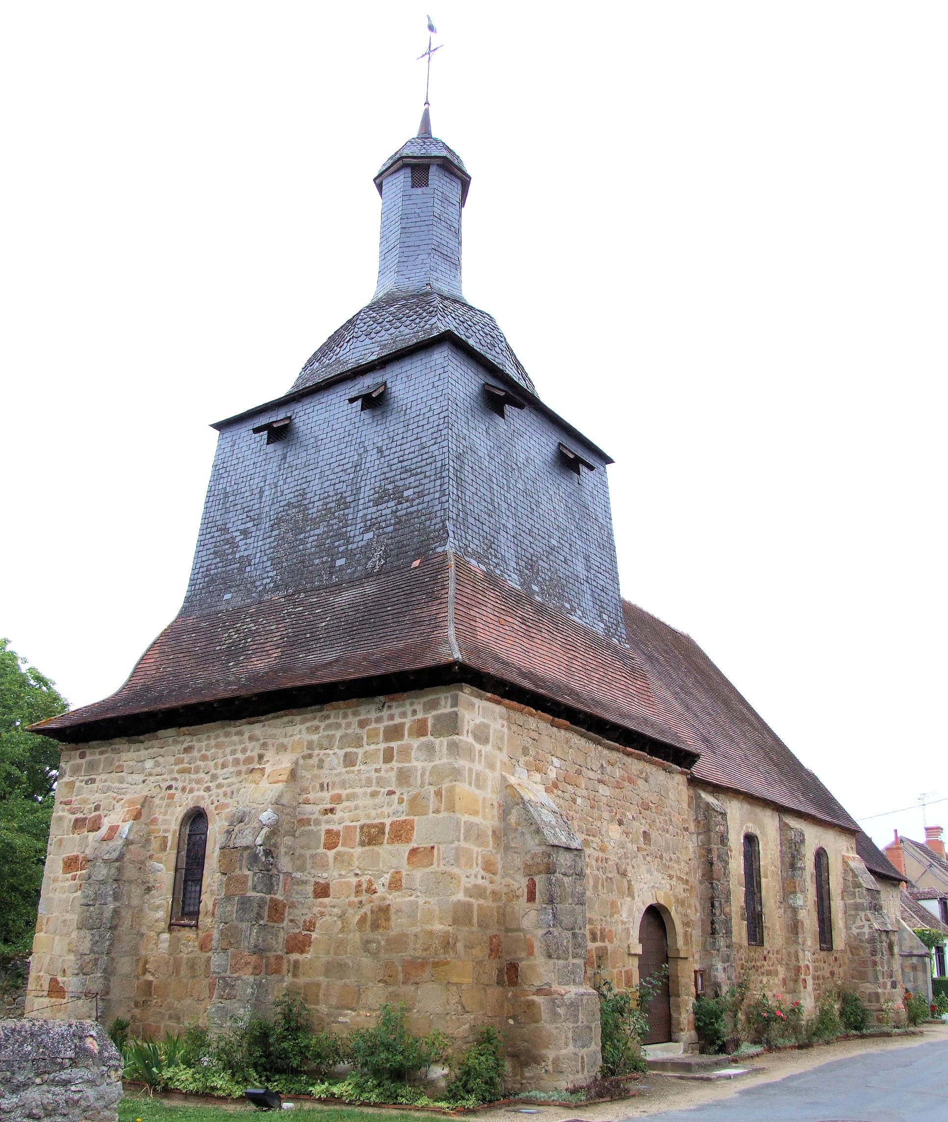 Épineuil-le-Fleuriel - Eglise Saint-Martin